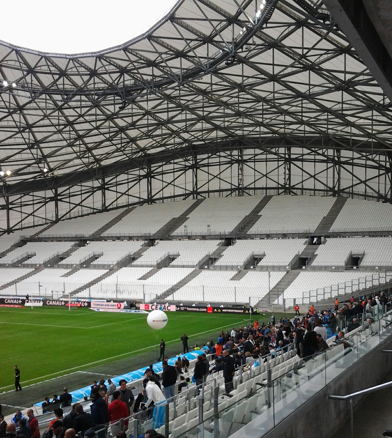 Virage Sud du stade Vélodrome à huit-clos lors d'OM-Lorient le 18 octobre 2015.